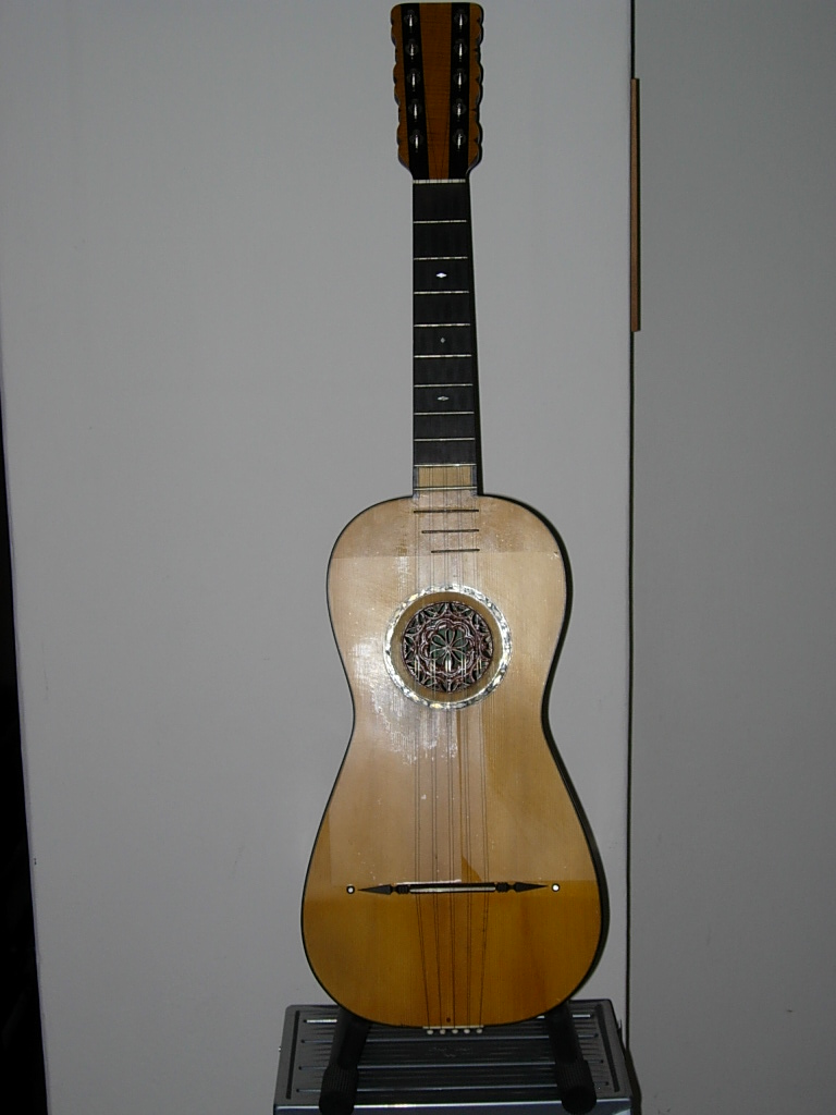 Foto mia personale, chitarra battente calabrese costruita da Costantino de Bonis